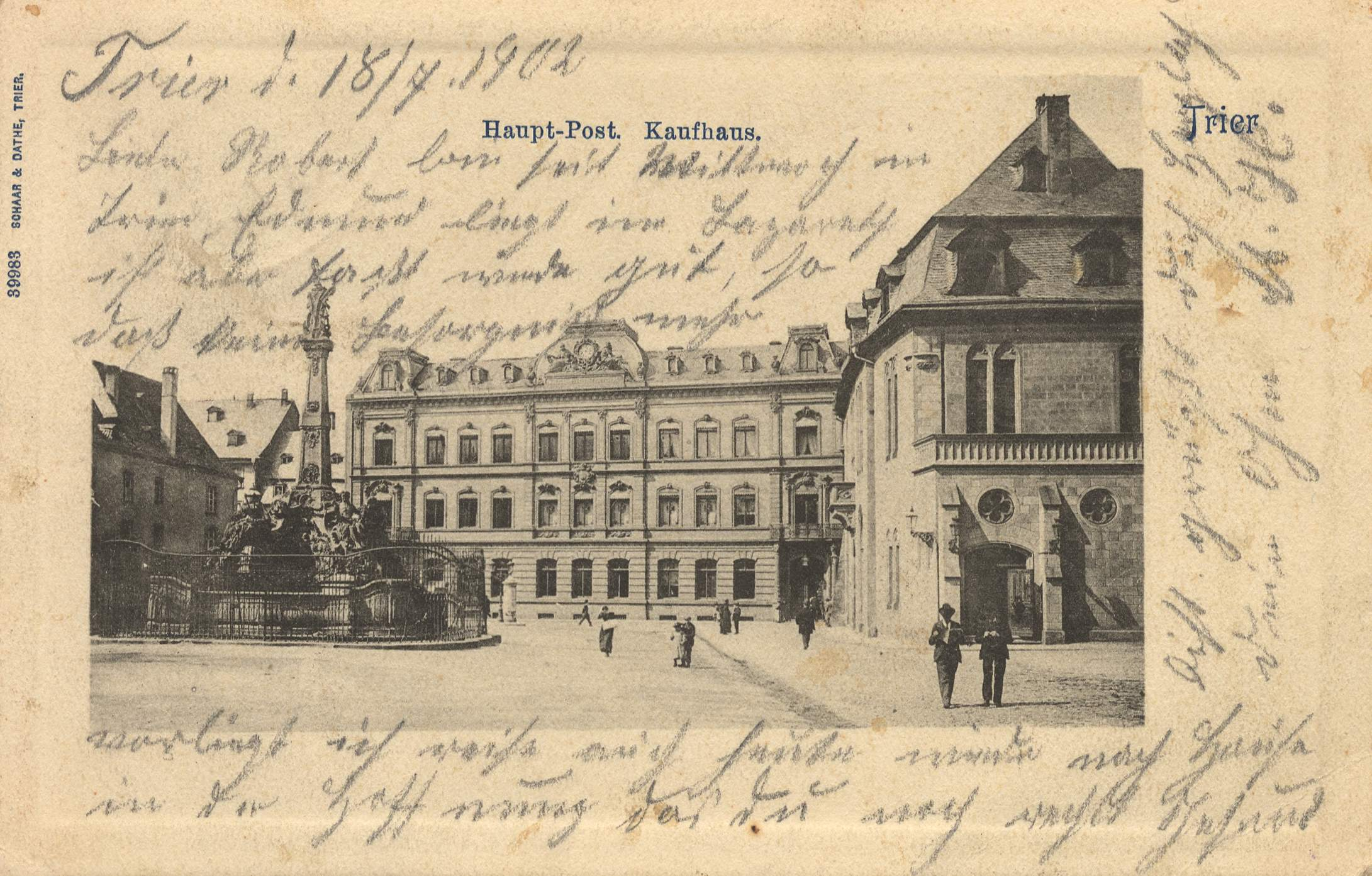 Postamt, Kaufhaus